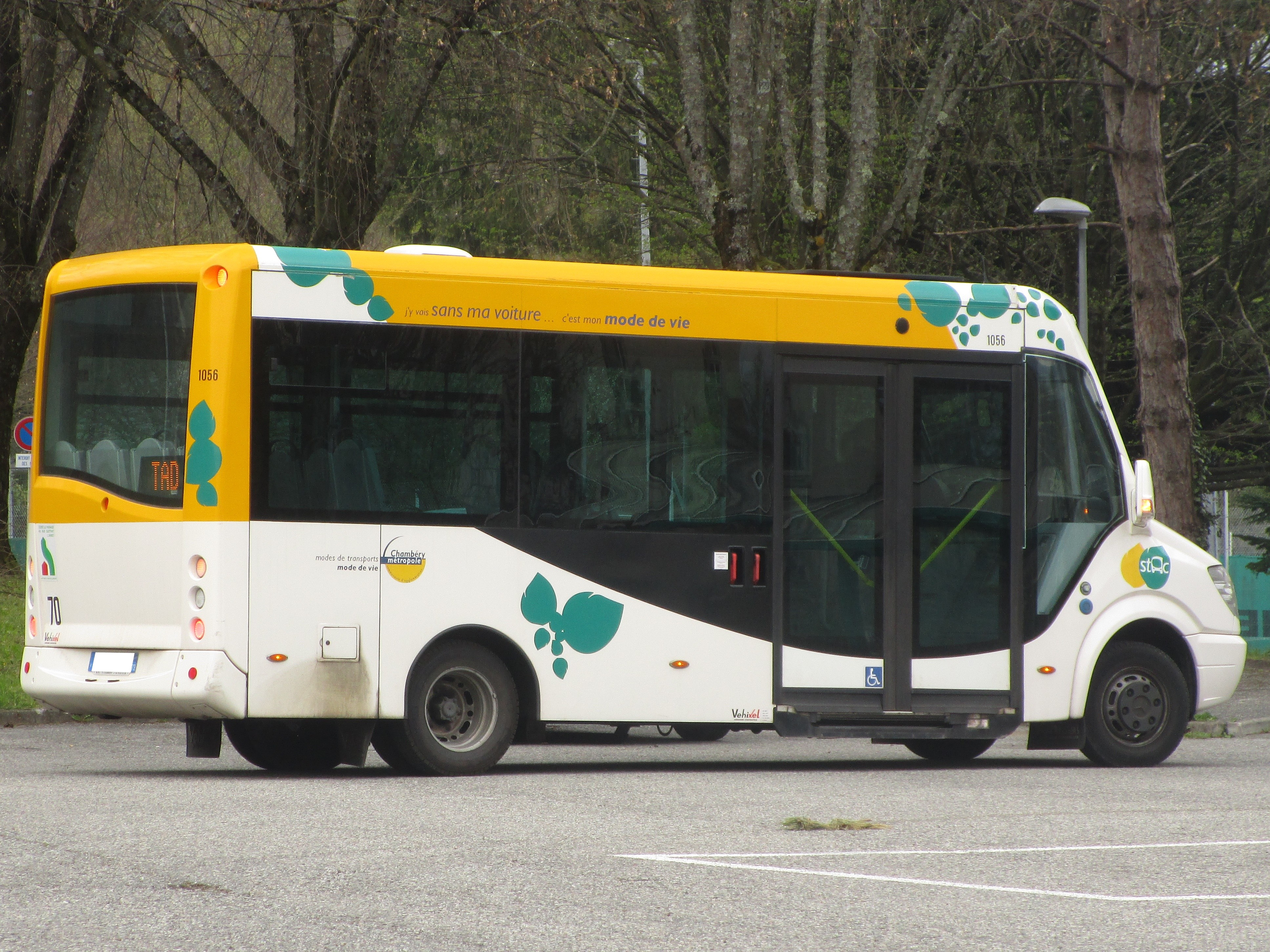 The bus Mercedes-Benz Vehixel Cytios 3 n°1056 of the Stac, on the service of Transport à la Demande, in Cognin on March 24, 2017.